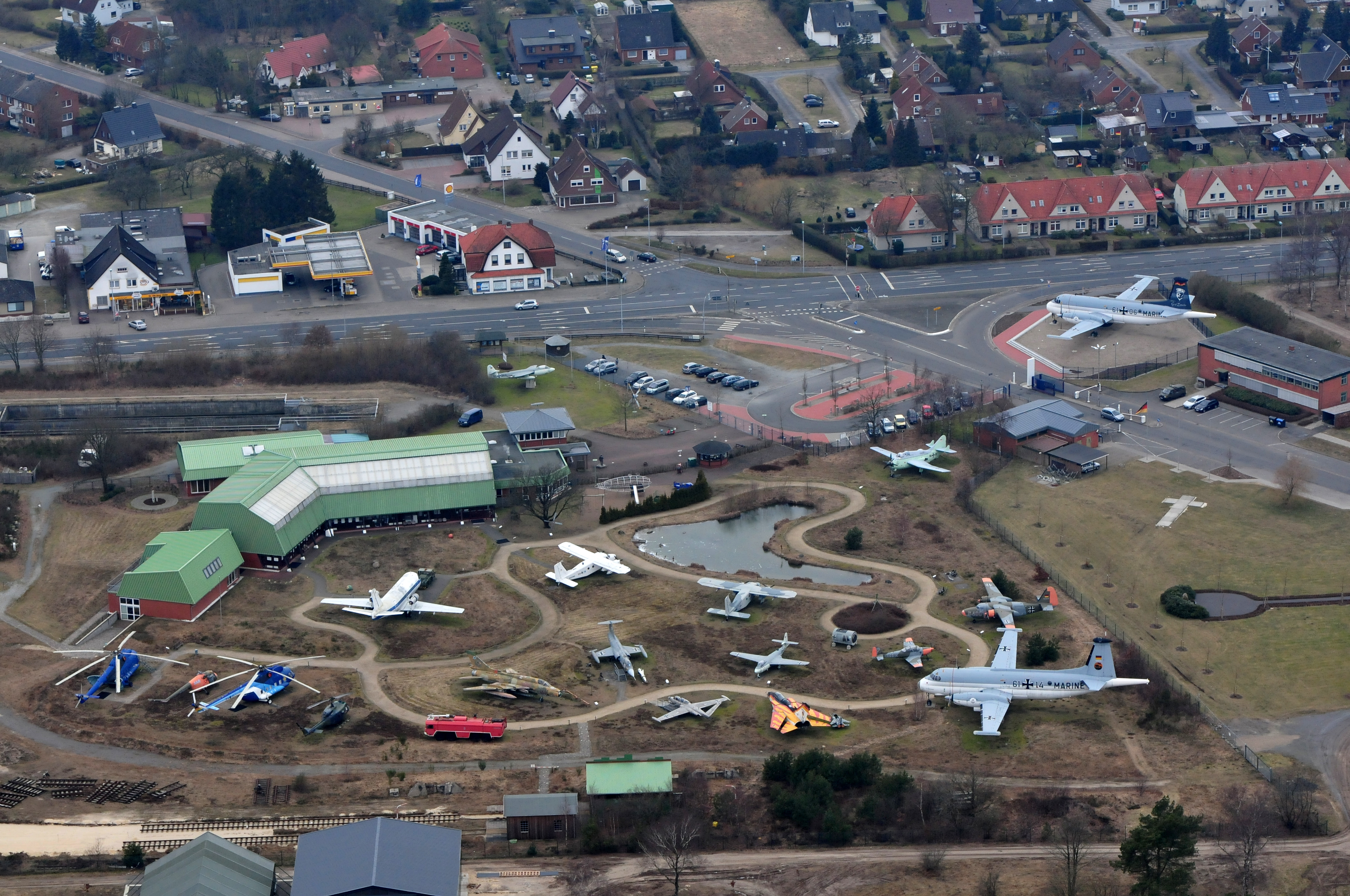 Luftaufnahme: Aeronauticum in Nordholz